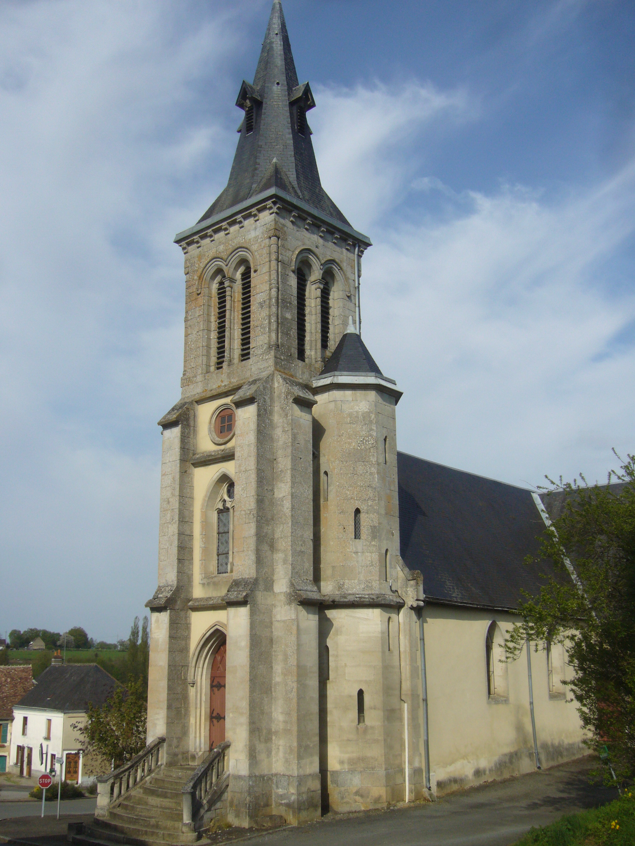 Église Saint-Sulpice de Dehault